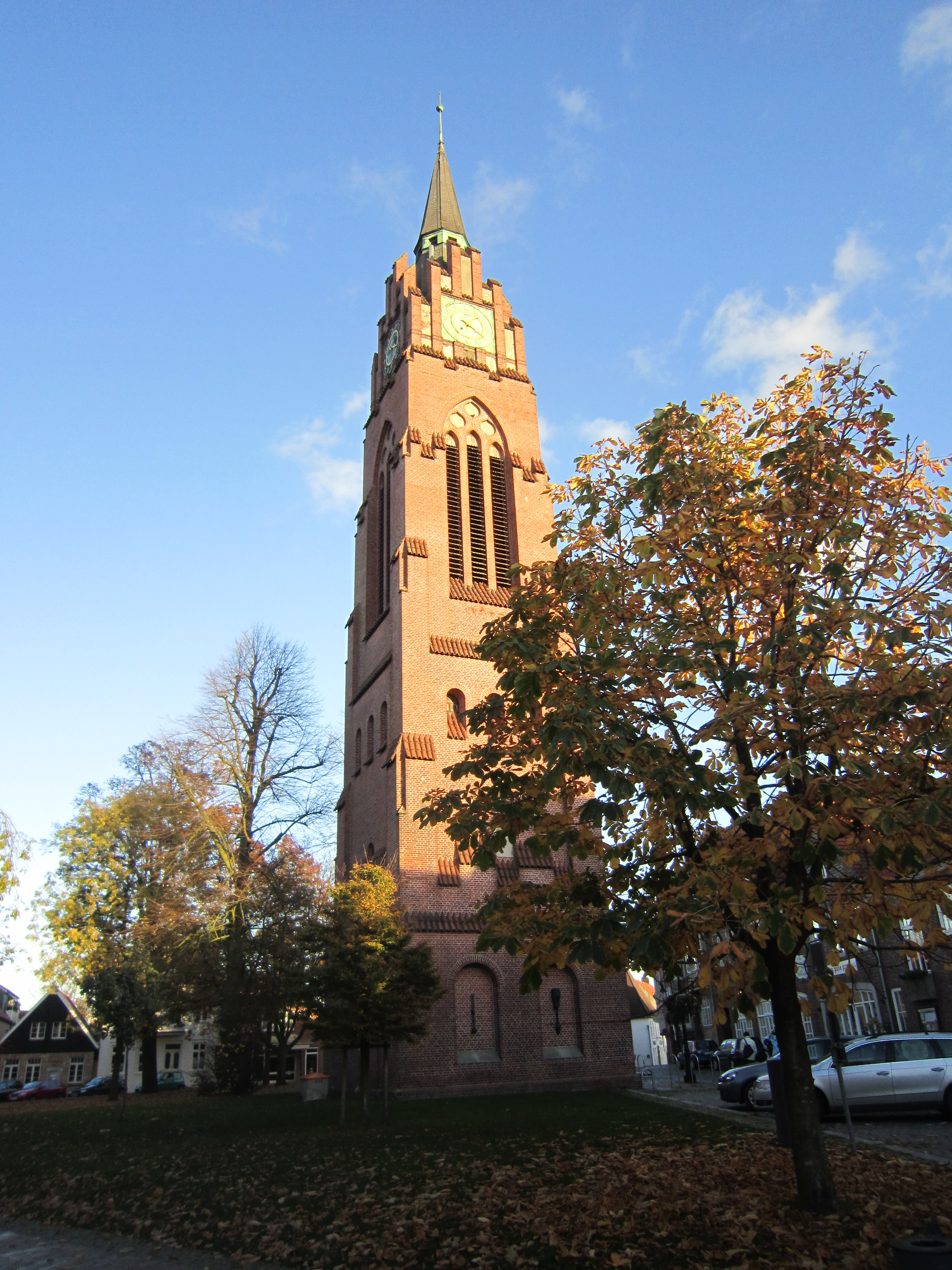 Jever